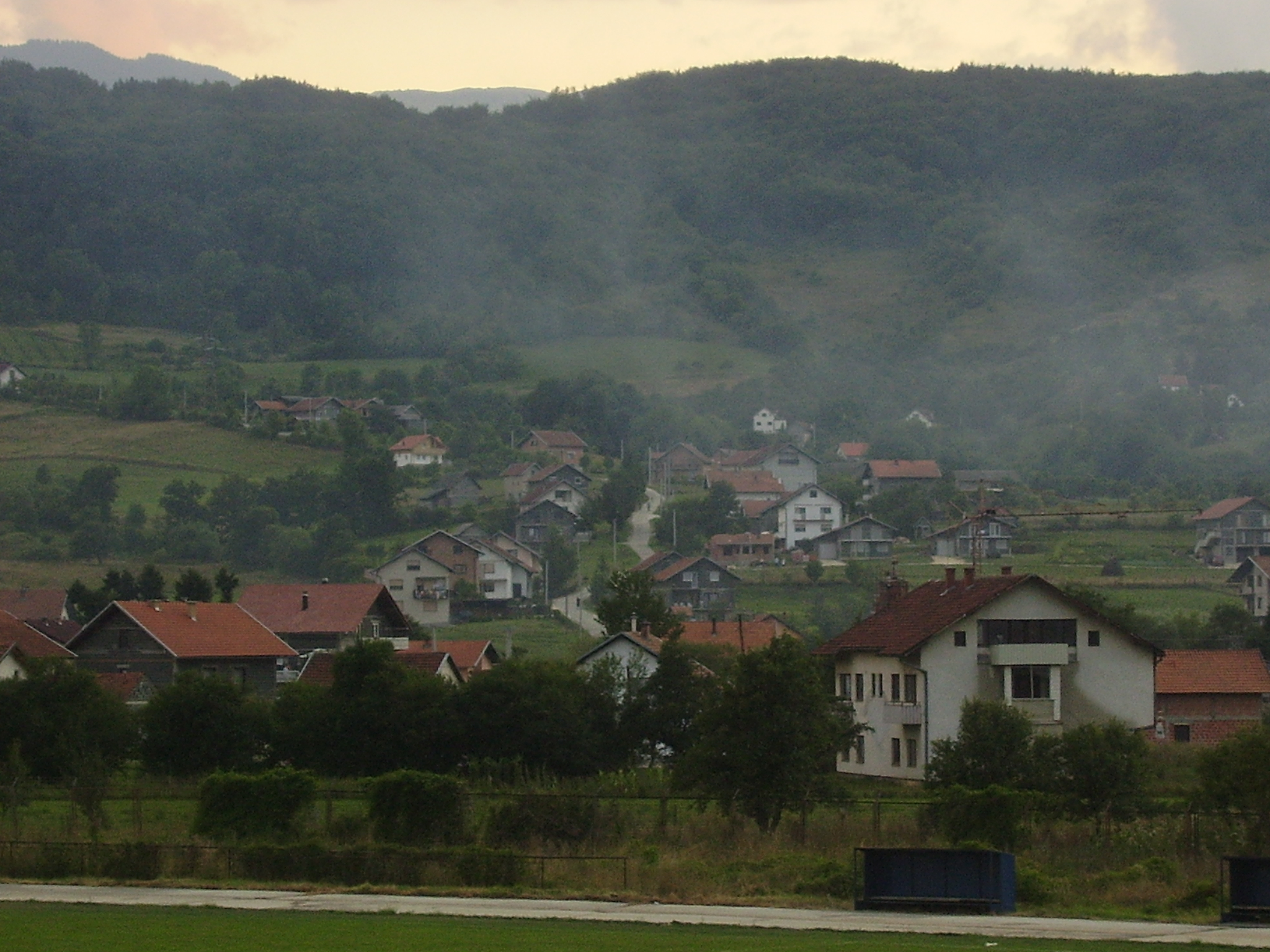 Pogled na selo Paloč iz Uskoplja